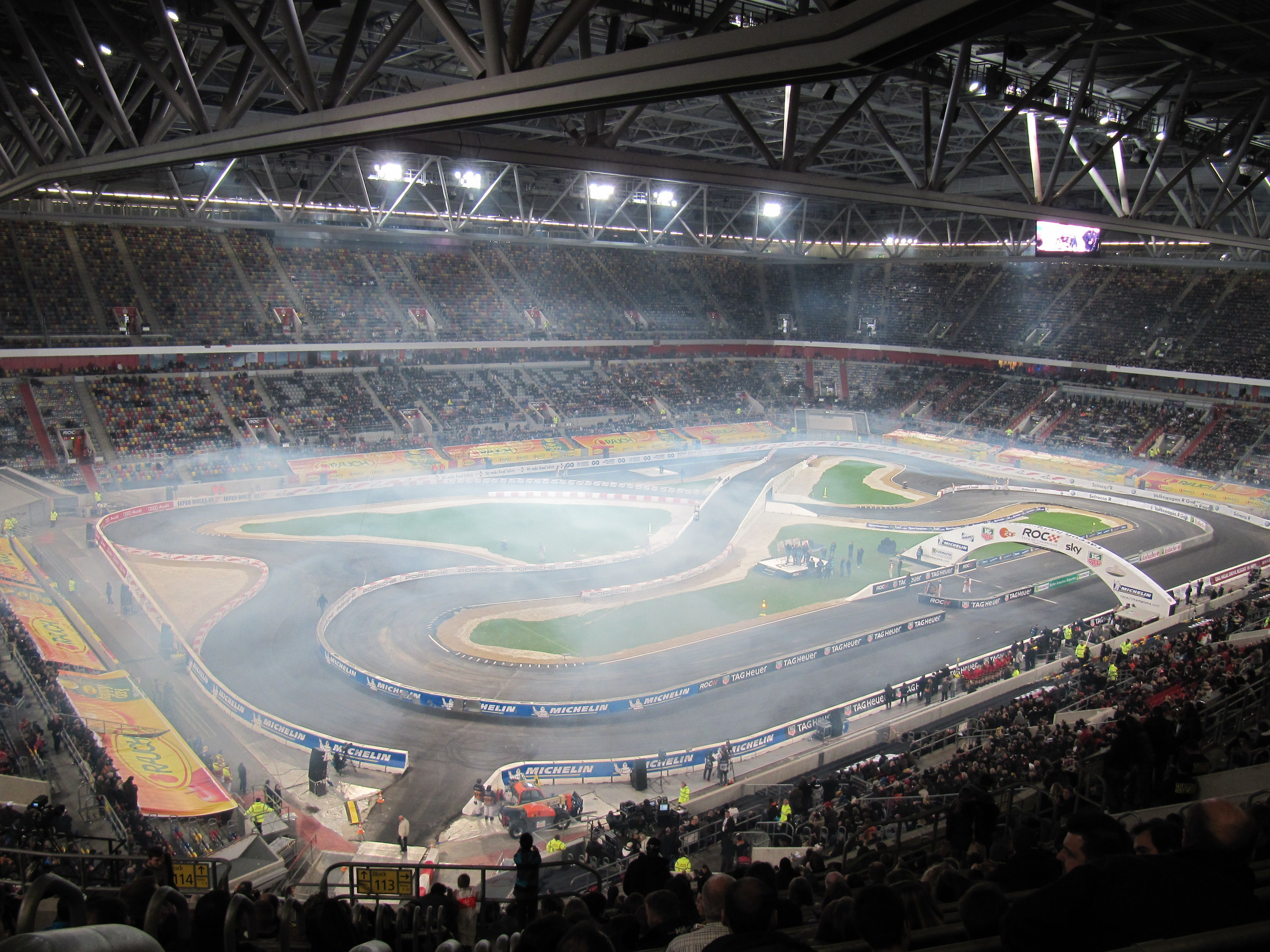 Rennstrecke des Race of Champions 2010 in der ESPRIT arena Düsseldorf